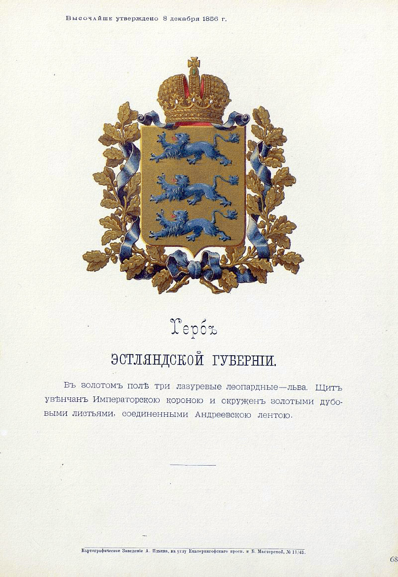 Official Russian Empire coat of arms Estlandia Governorate. Герб Российской Империи Эстляндской губернии с официальным описанием в Гербовнике Бенке. Утверждён Императором Всероссийским Александром Вторым.